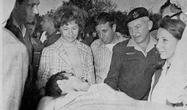 הרמטכ"ל רא"ל חיים בר-לב משוחח עם סרן גיורא רום בשובו מהשבי המצרי בנוכחות בני משפחתו